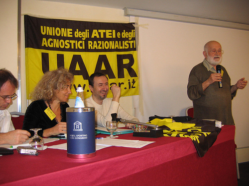 Foto dell'8° congresso dell'UAAR